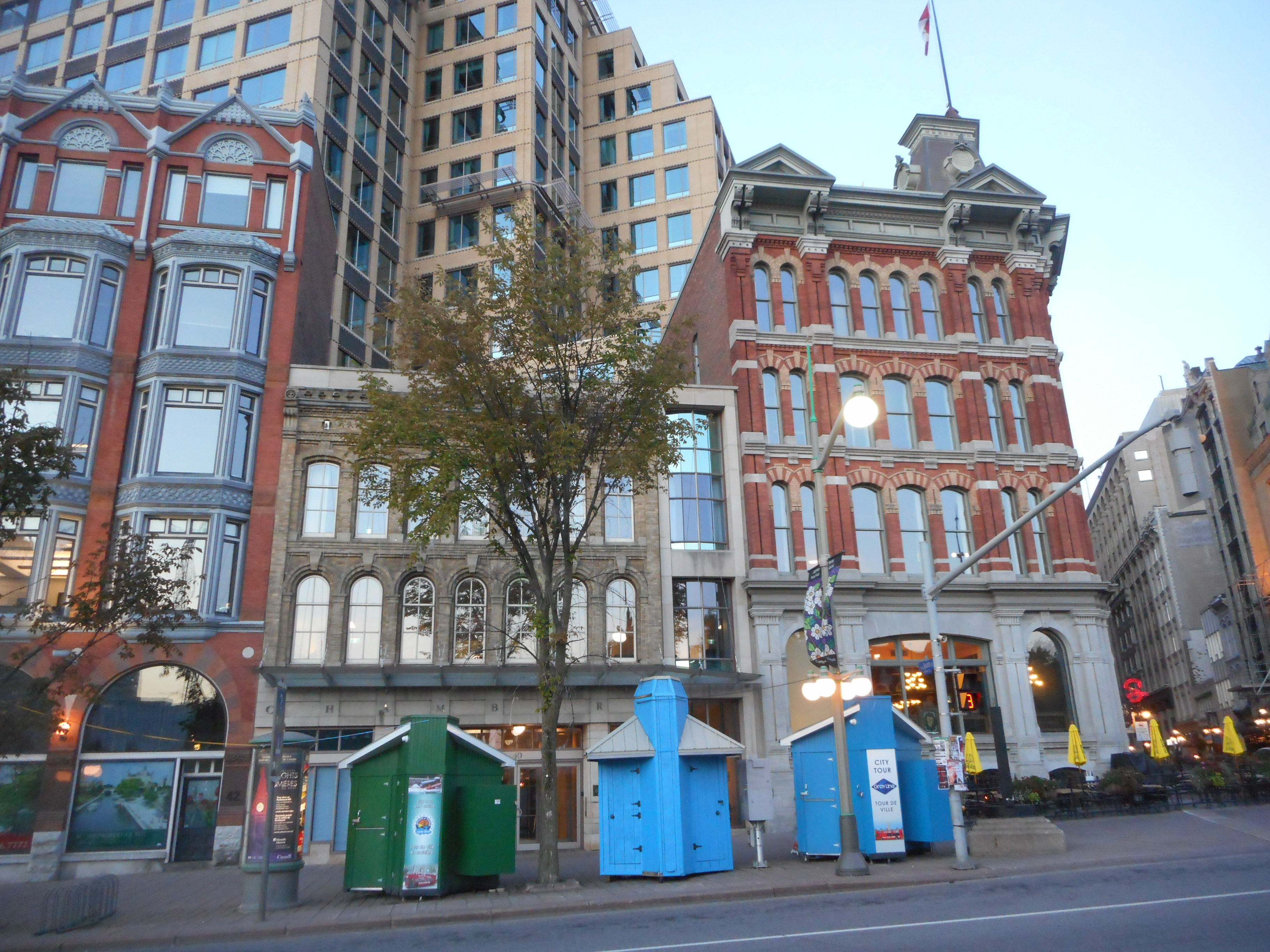 Au centre : Bell Block, 40 rue Elgin, Ottawa (adresse de la Commission de la capitale nationale) Kiosques d'information touristique sur le trottoir À gauche : Central Chambers À droite : Édifice Scottish Ontario, 42-50, rue Sparks